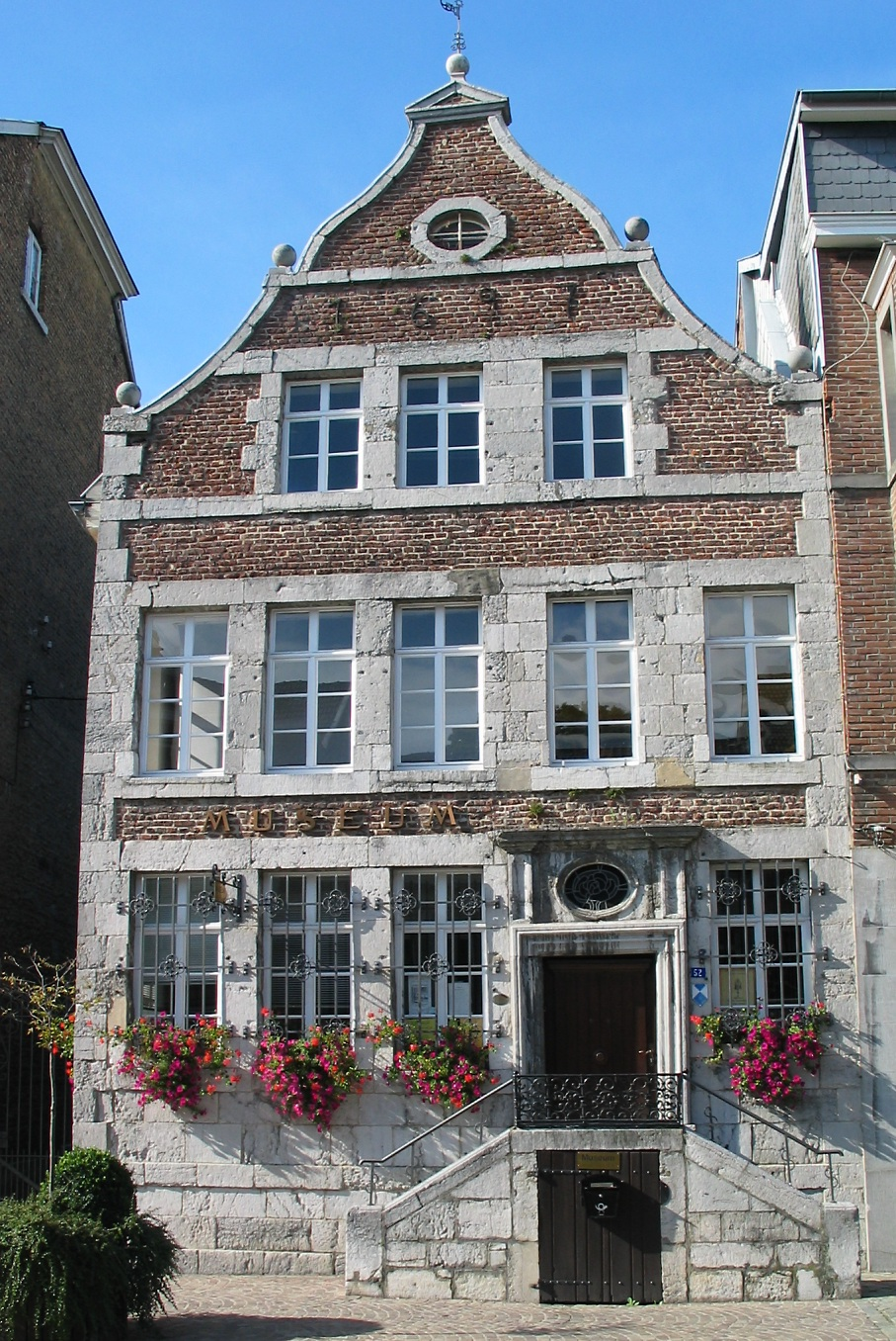 Stadtmuseum Eupen, Ehemaliges Kaufmannshaus, 1697